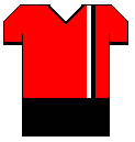 Shirt Eintracht F.